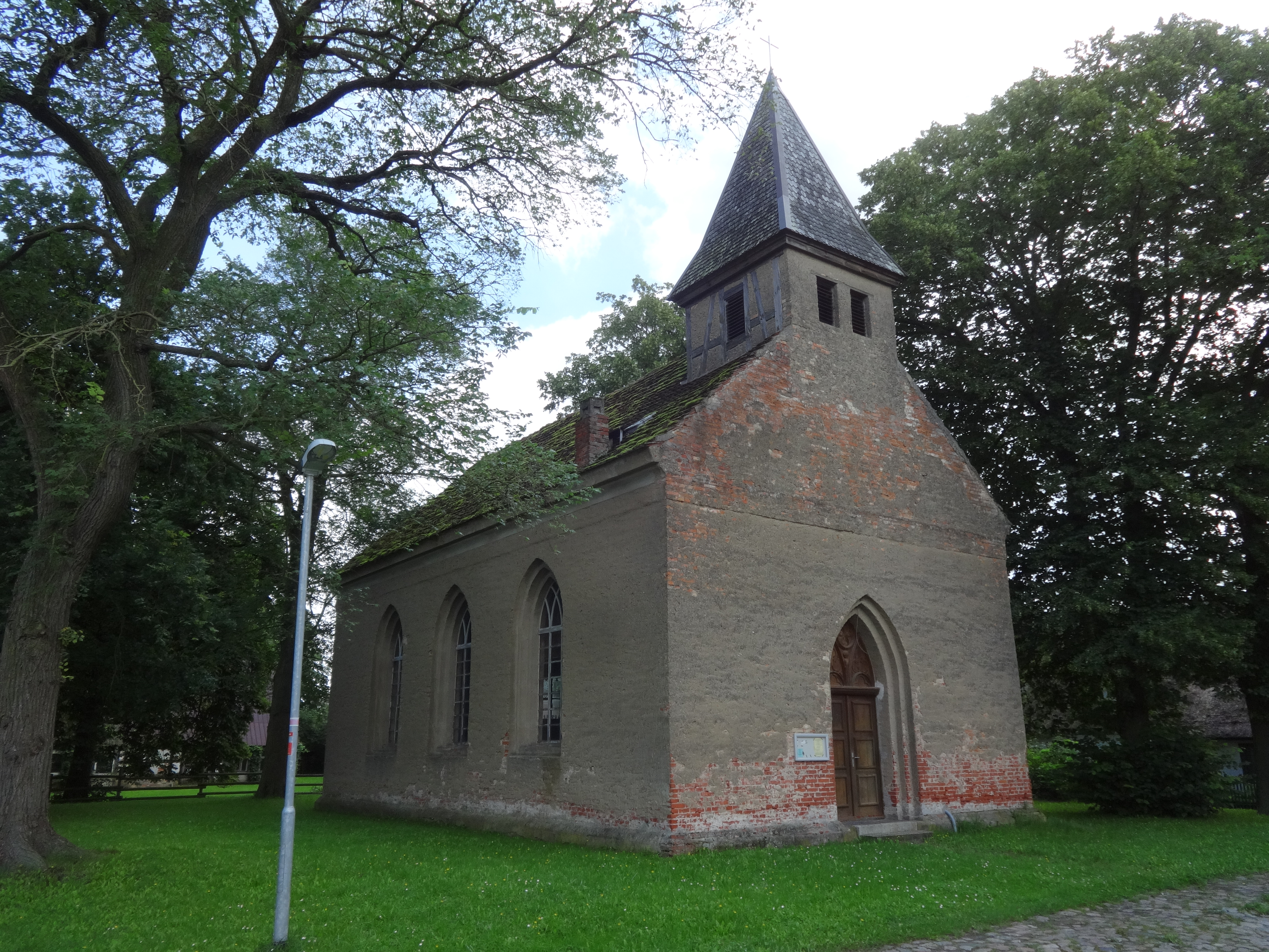 Die Kapelle in Rosenhagen in der Gemeinde Bugewitz entstand vermutlich im 17. Jahrhundert. Im Innern steht eine neugotische Ausstattung mit Kanzelaltar und verglaster Westempore.